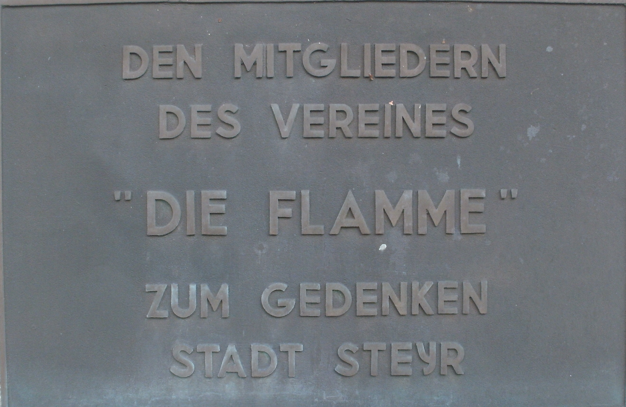 Steyr, Urnenfriedhof am Tabor - Eingang Taborweg: Gedenktafel